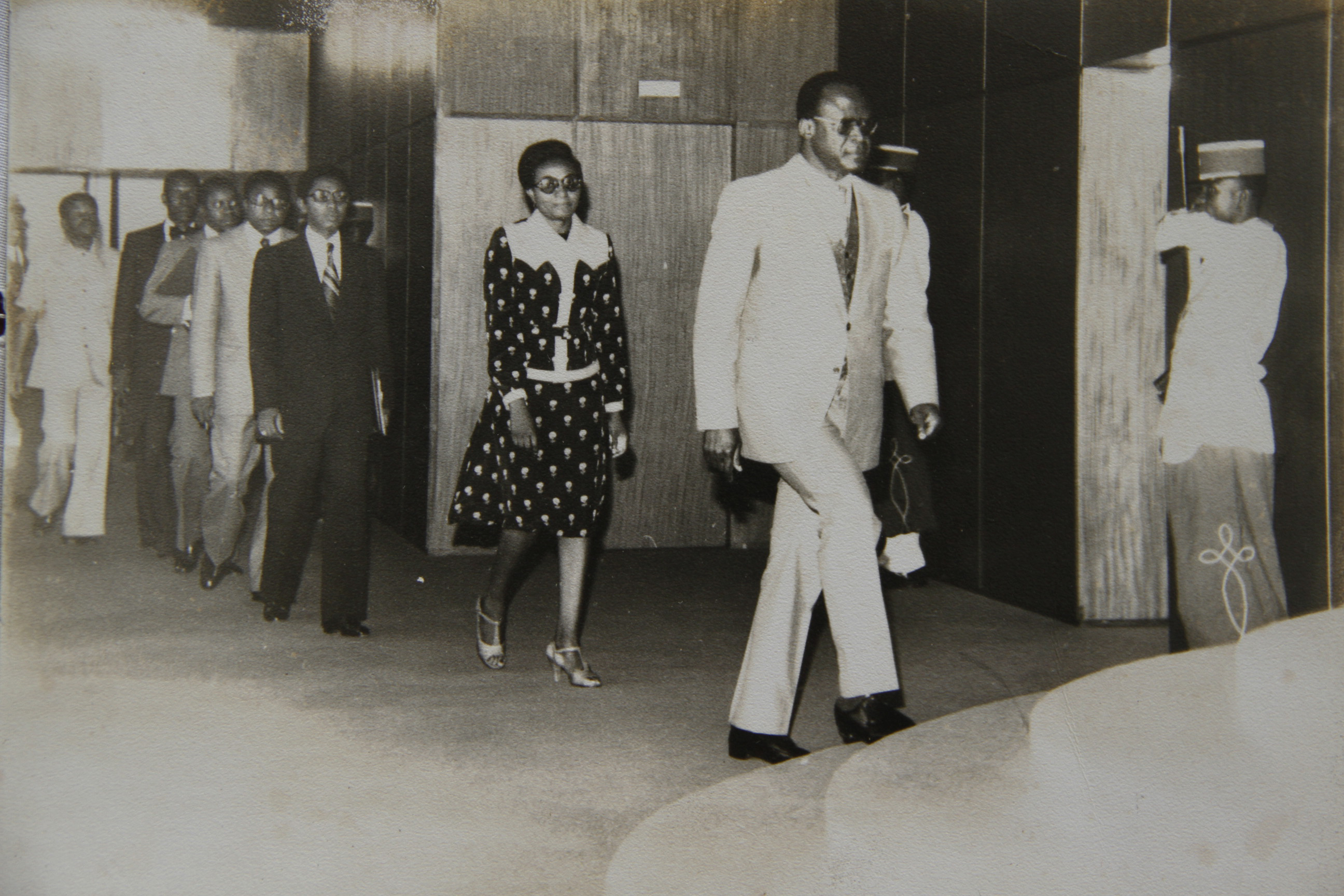 Mme Ebanda, secrétaire du bureau de l'Assemblée nationale du Cameroun à la suite du président Salomon Tandeng Muna